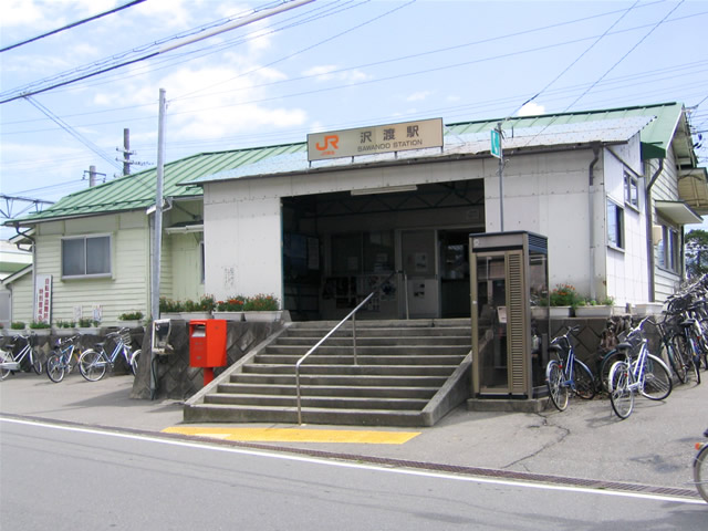 沢渡駅 2005年8月15日に投稿者が撮影 Category:伊那市の画像